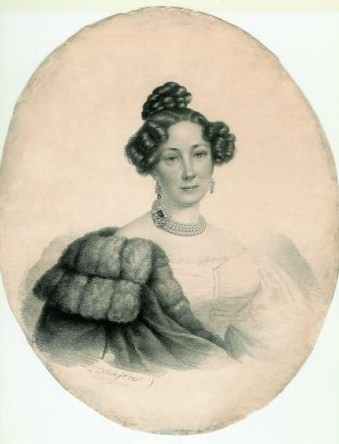 Ольга Алексеевна Жемчужникова, ур. Перовская (1798—1833), внебрачная дочь А. К. Разумовского.